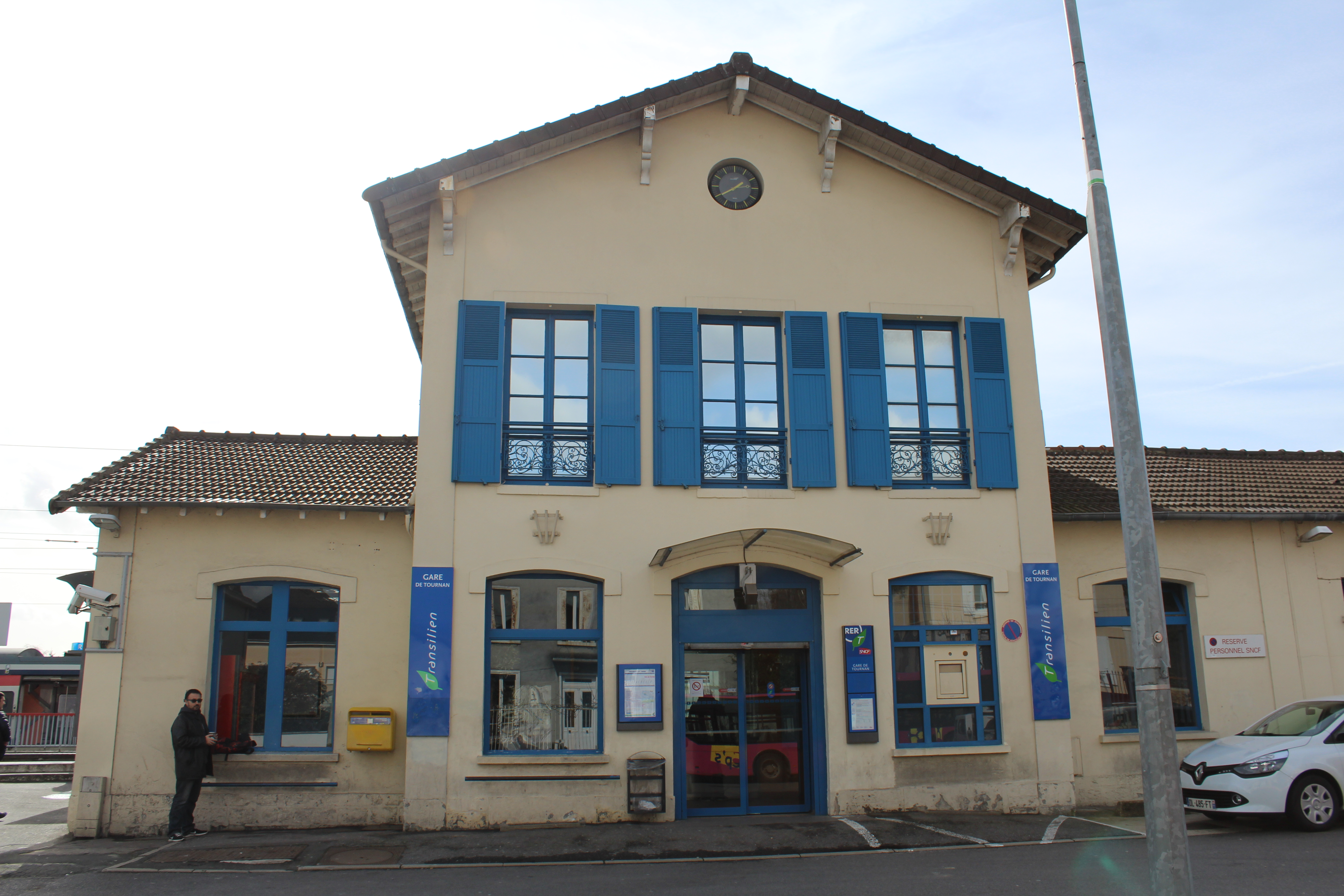 Gare de Tournan